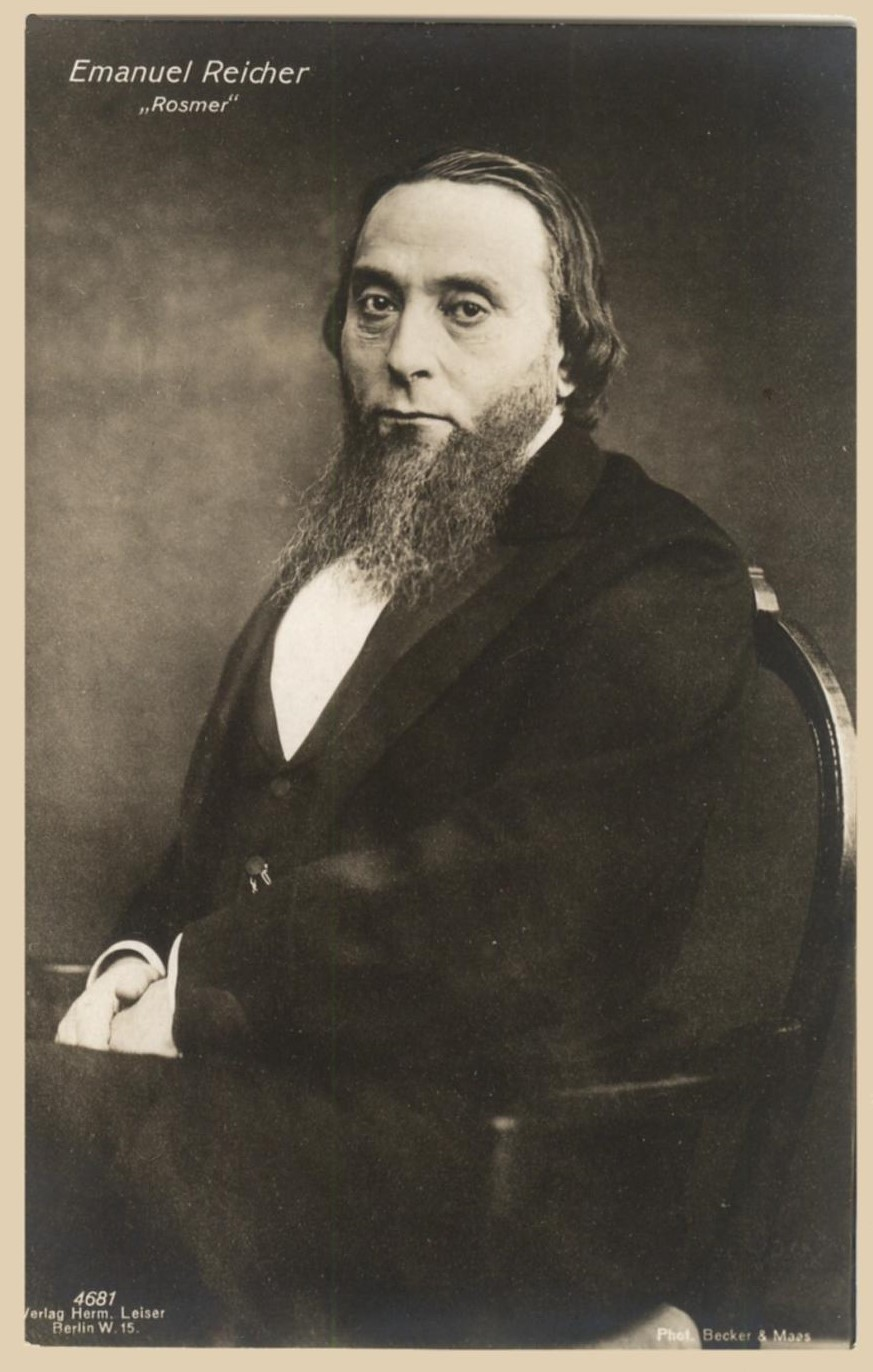 Der Schauspieler Emanuel Reicher als Rosmer um 1920. Photopostkarte des Ateliers (Otto) Becker & (Heinrich) Maass